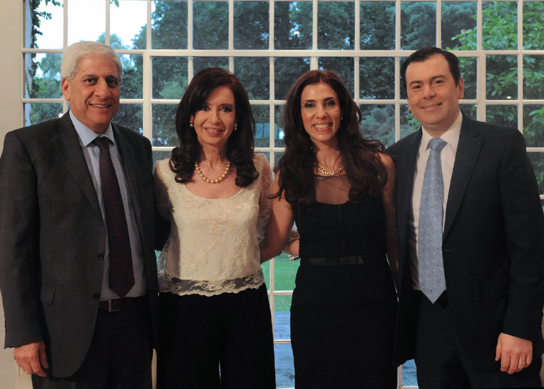 La presidenta de la Republica Argentina, Cristina Fernandez de Kirchner con el entonces gobernador de la provincia de Santiago del Estero, Gerardo Zamora. Reunidos con la gobernadora electa de la provincia para el periodo 2013-2017, Claudia Ledesma Abdala y su compañero de formula José Emilio Neder.